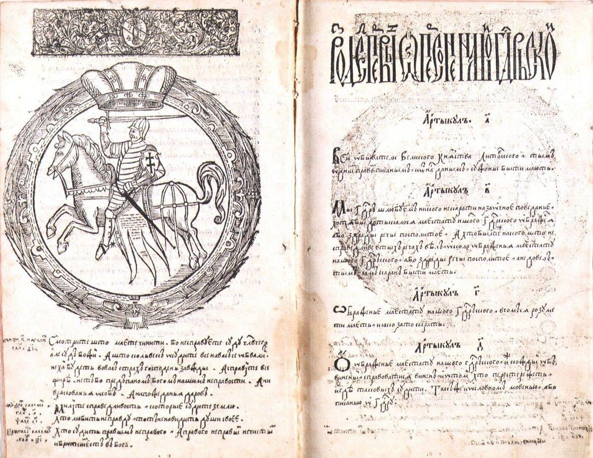 Беларуская (тарашкевіца): Трэці Статут Вялікага Княства Літоўскага